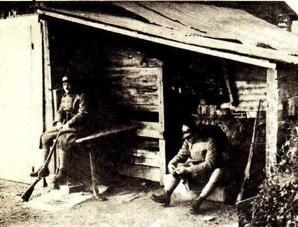 Armia Polska we Francji: Żołnierze w obozie ćwiczebnym Coetquidan podczas odpoczynku. Widać karabiny Berthier wz. 1907/15